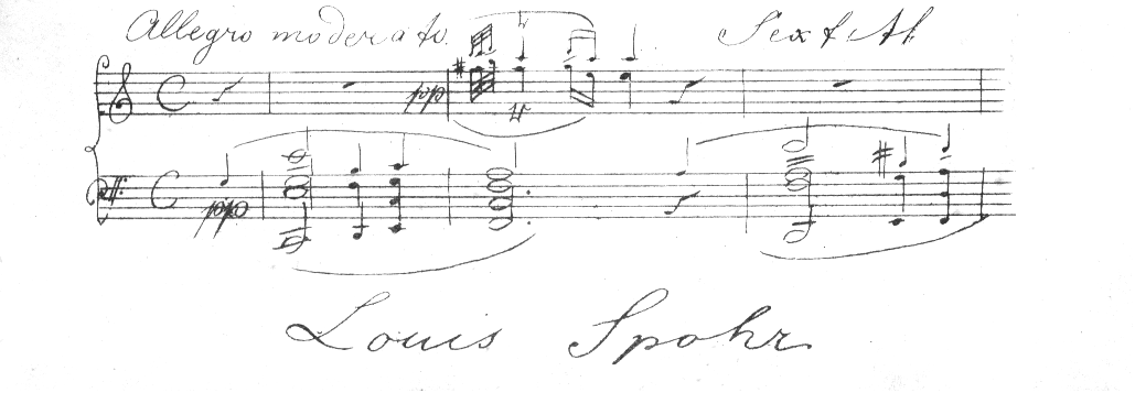 autographe musical de Ludwig Spohr et signature